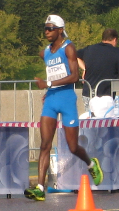 Чемпионат мира по лёгкой атлетике 2013. Ходьба 50 км, мужчины: Жан-Жак Нкоулукиди